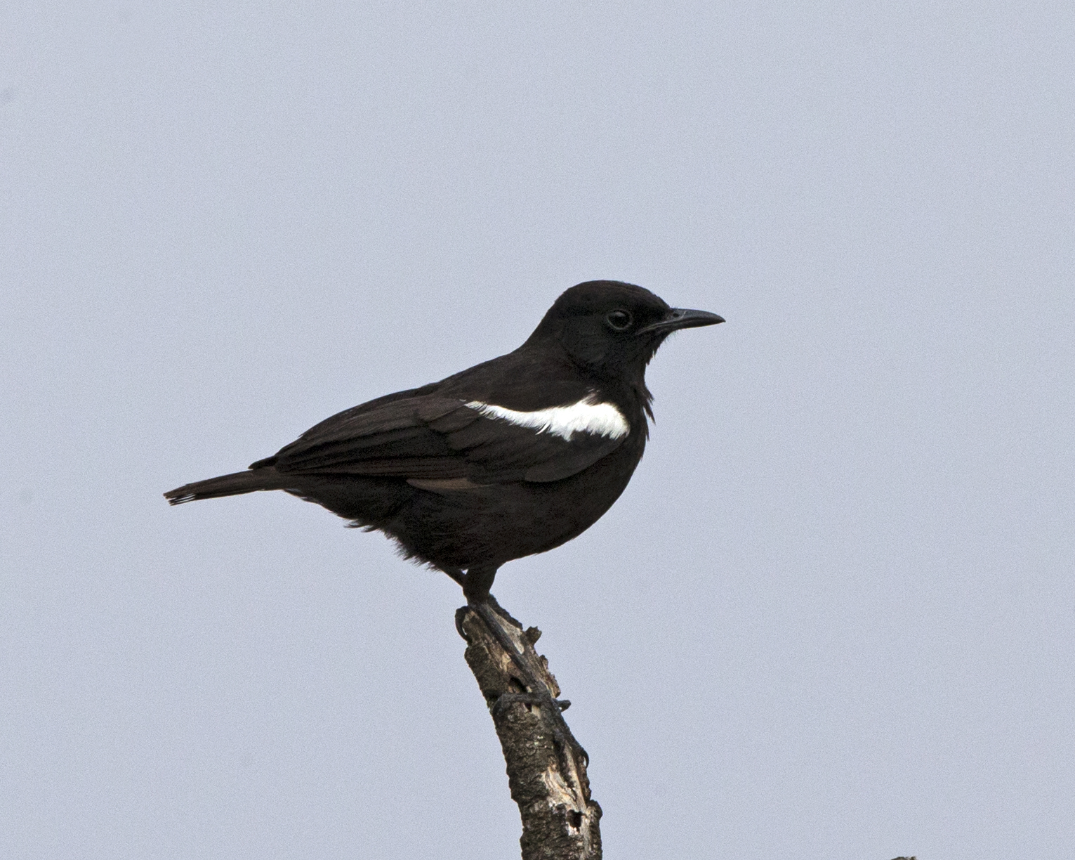 Sooty Chat Myrmecocichla nigra Masai Mara, Kenya 3rd. September 2013 CF2P6556